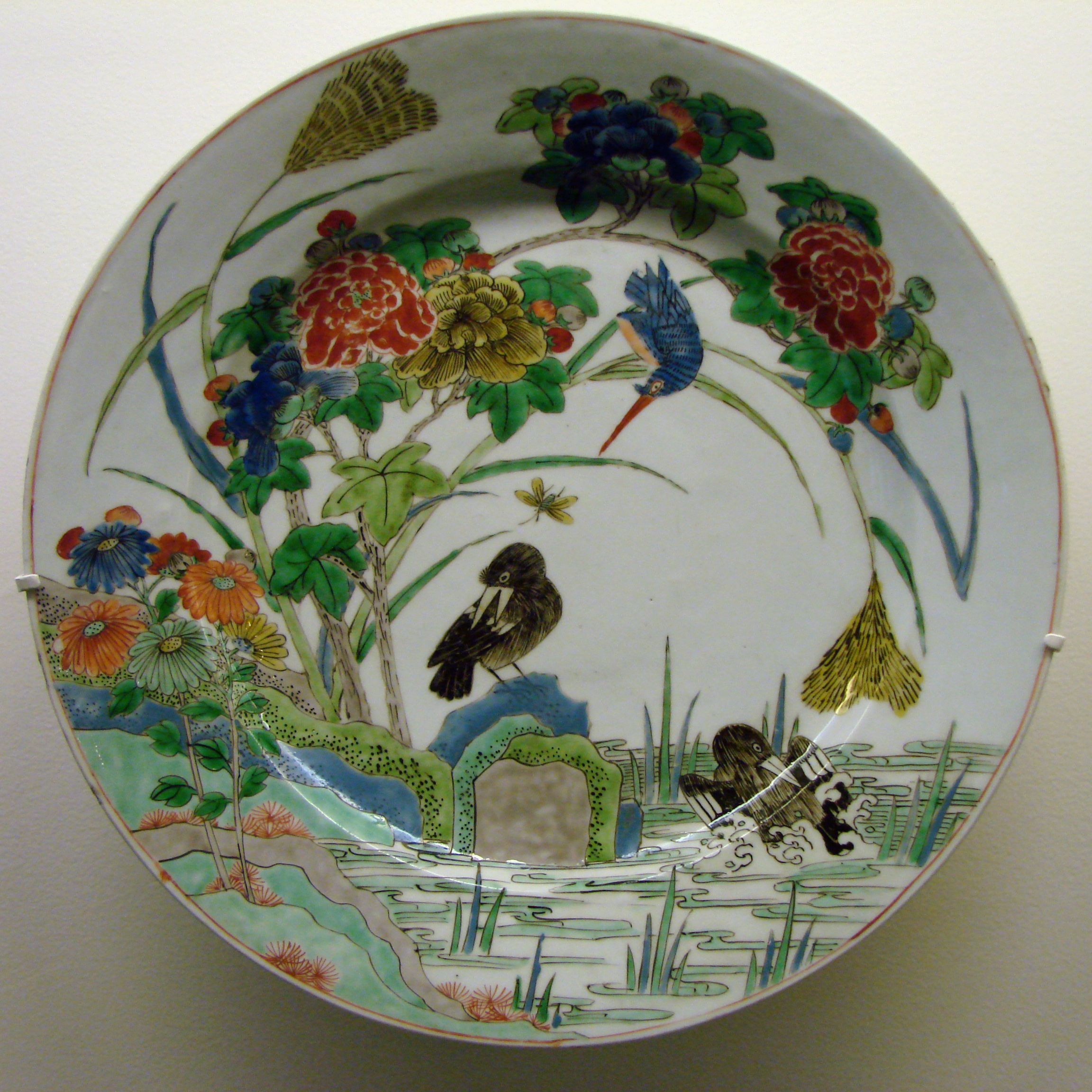 Plat à décor aquatique, dynastie Qing, période Kangxi (1662-1722), fin du 17ème siècle. Musée Guimet, Paris.